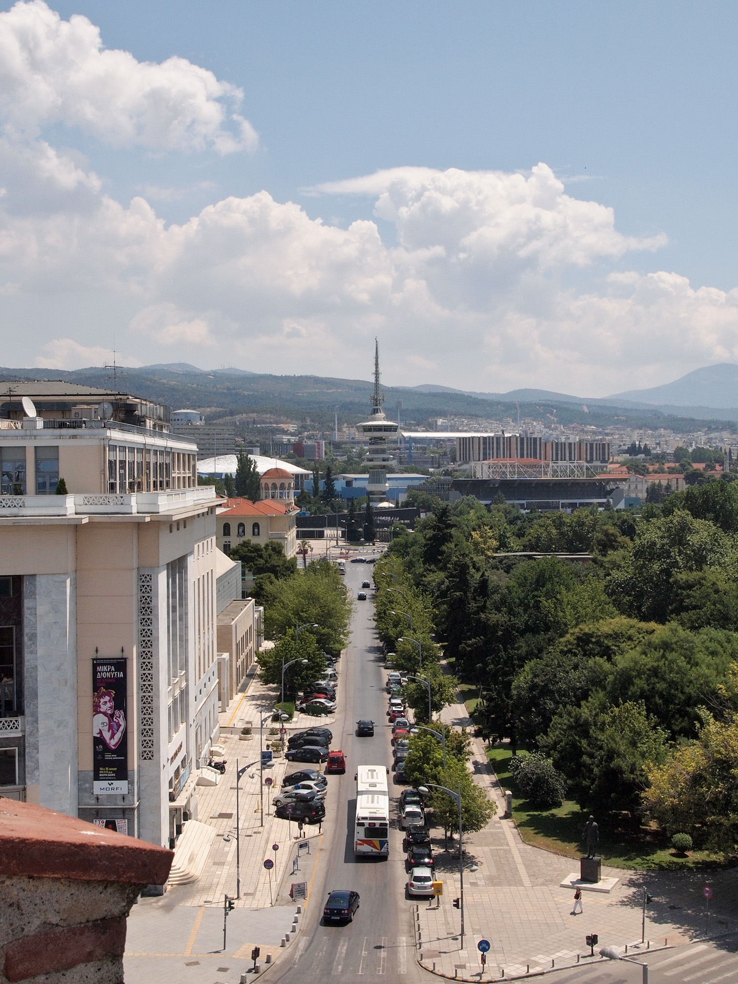 вид с Белой Башни на телевышку